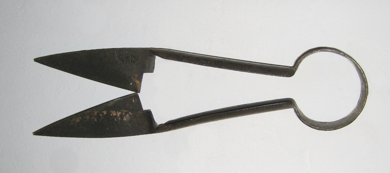 Schafschere im Heimatmuseum in Meschede-Eversberg.